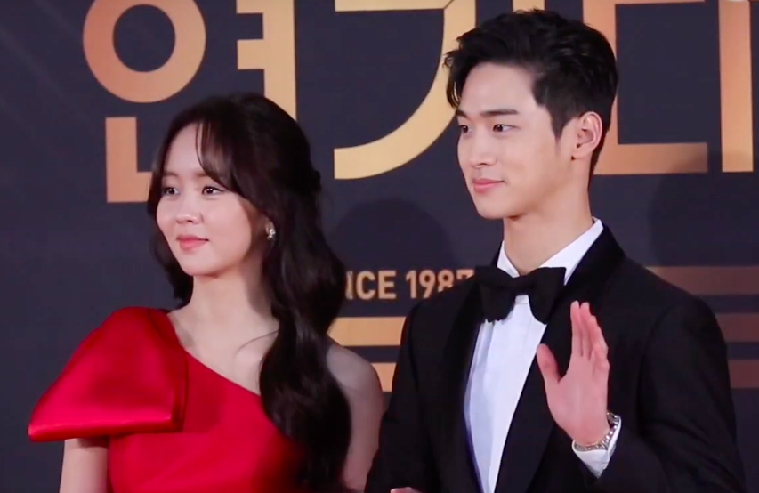 191231 KBS연기대상 김소현 장동윤.